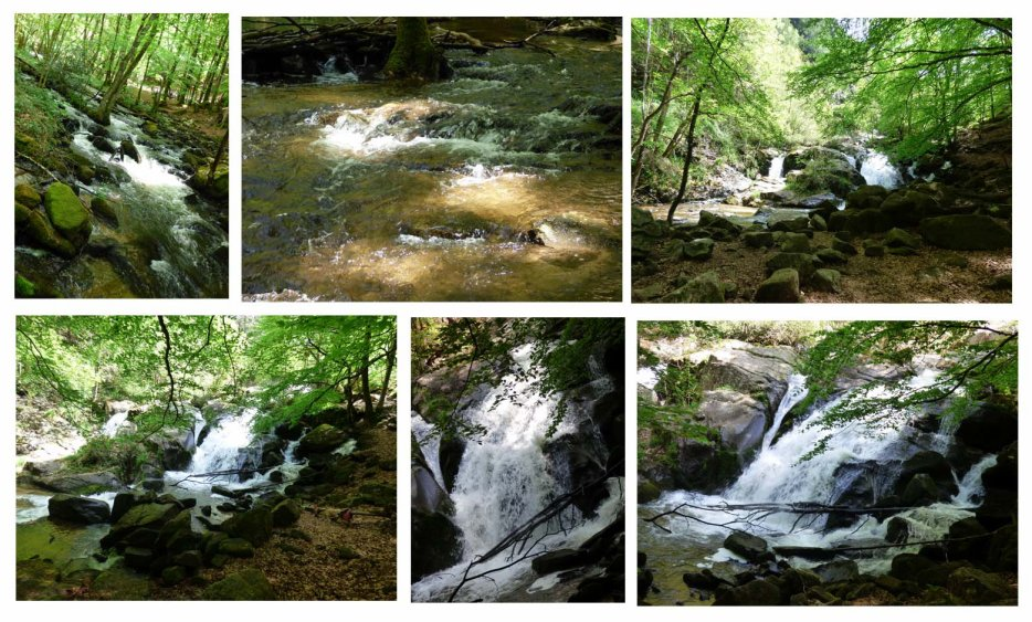 Cascade de la Terisse, Auvergne, Novembre 2015